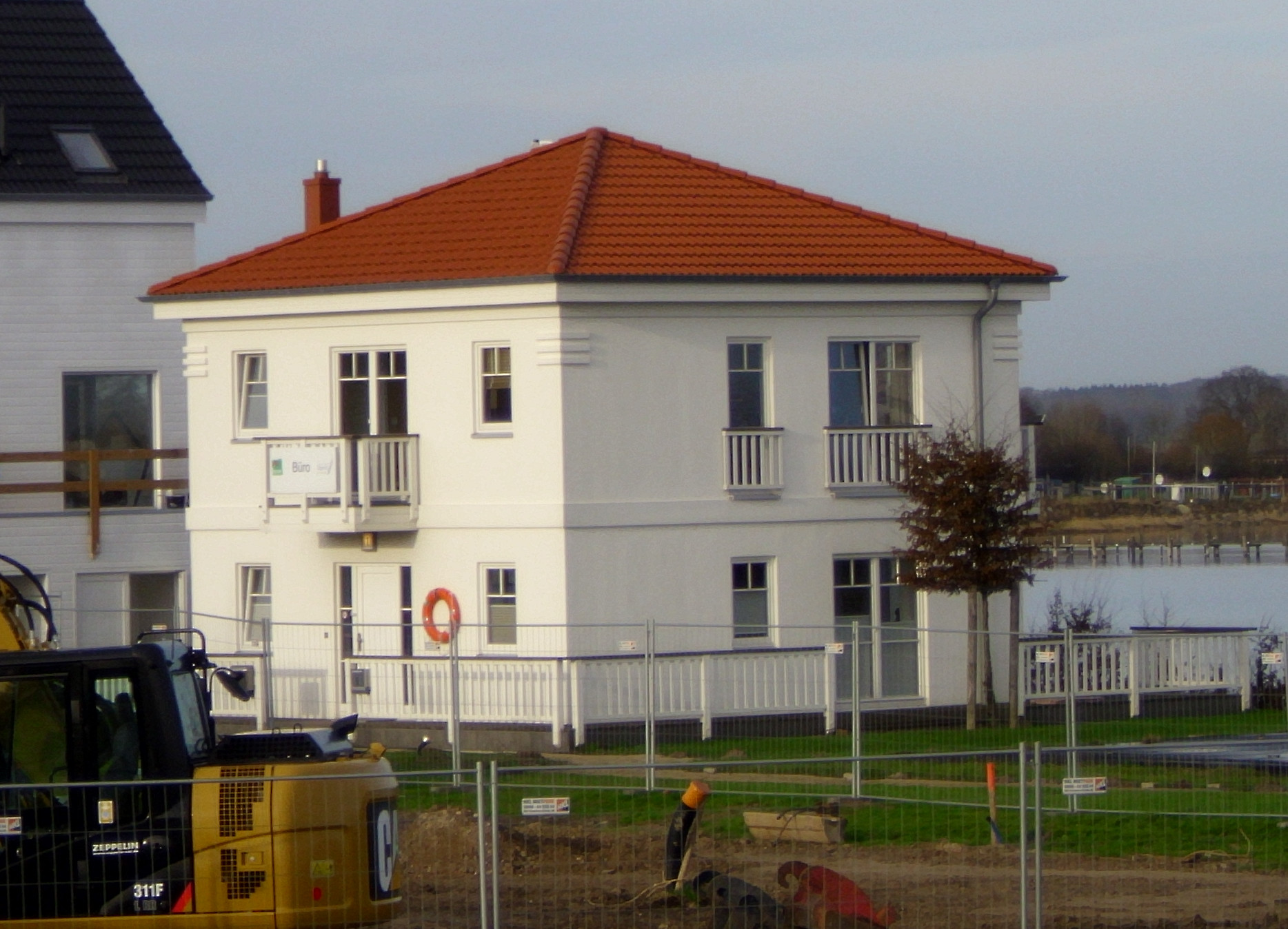 Das erste Musterhaus in Port Olpenitz vom Typ „Gunneby“. Heute befindet sich darin ein Büro der HELMA Ferienimmobilien GmbH